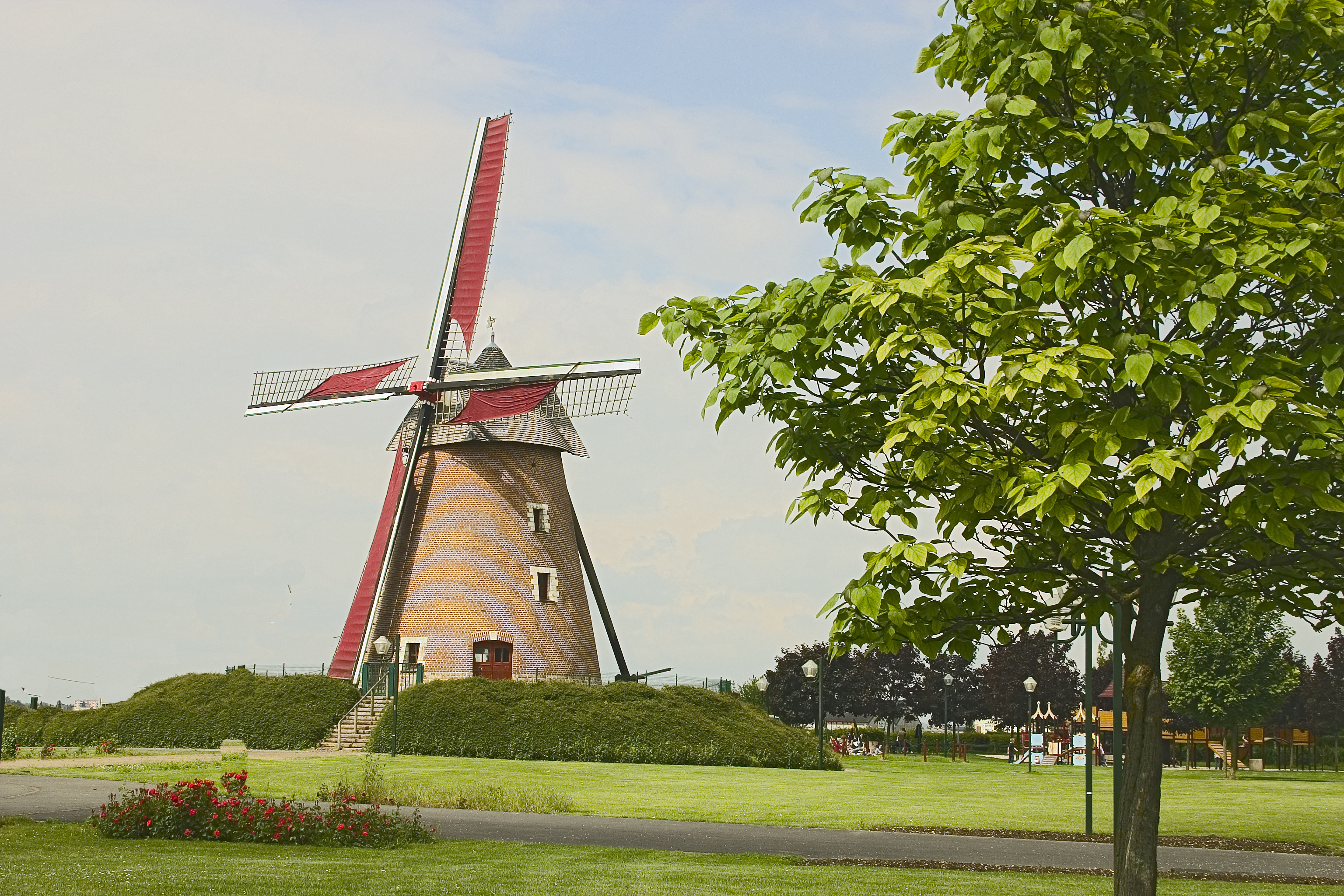 Le moulin d'Achicourt a été reconstruit à l'identique.